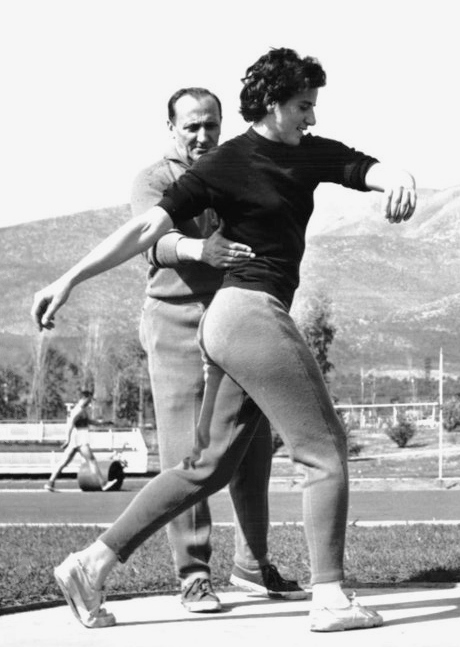 Paola Paternoster